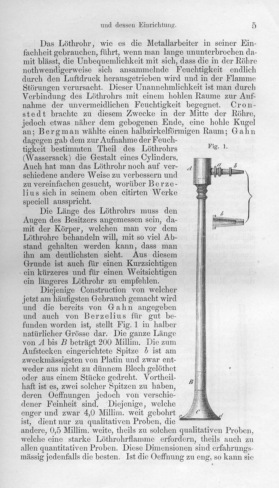 Lötrohr (Prinzipskizze, Xylographie) und Kurzbeschreibung